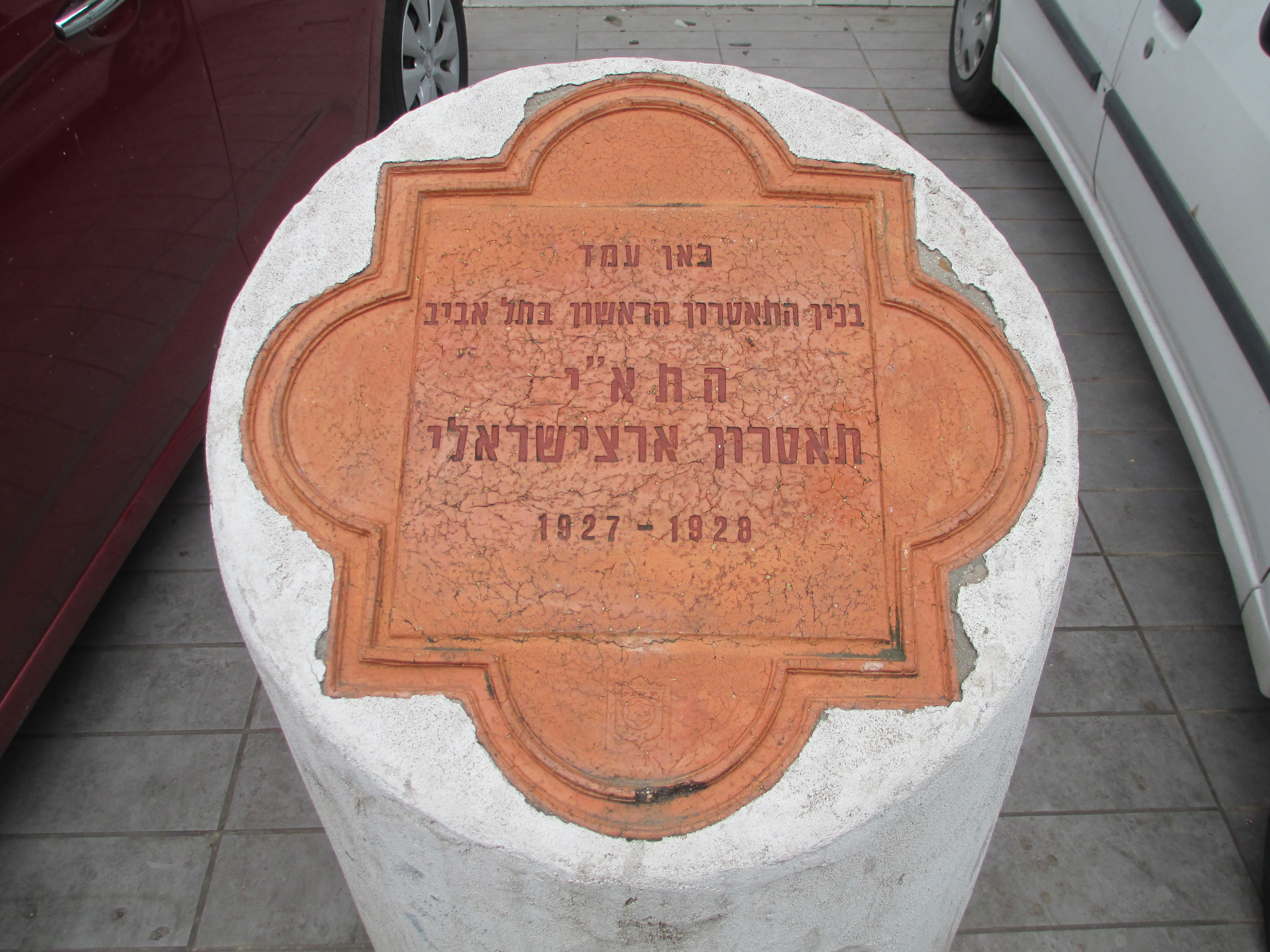 עמוד זיכרון במקום בו עמד בנין התיאטרון הארץ ישראלי בשדרות רוטשילד 80 בתל אביב